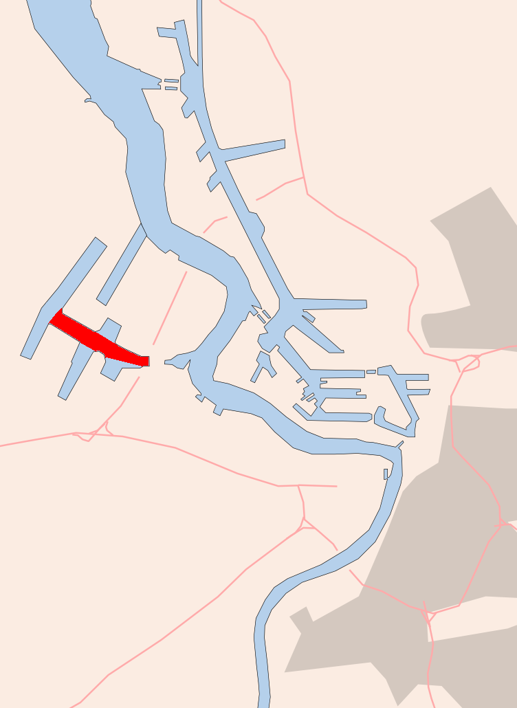 Antwerp , Waaslandkanaal